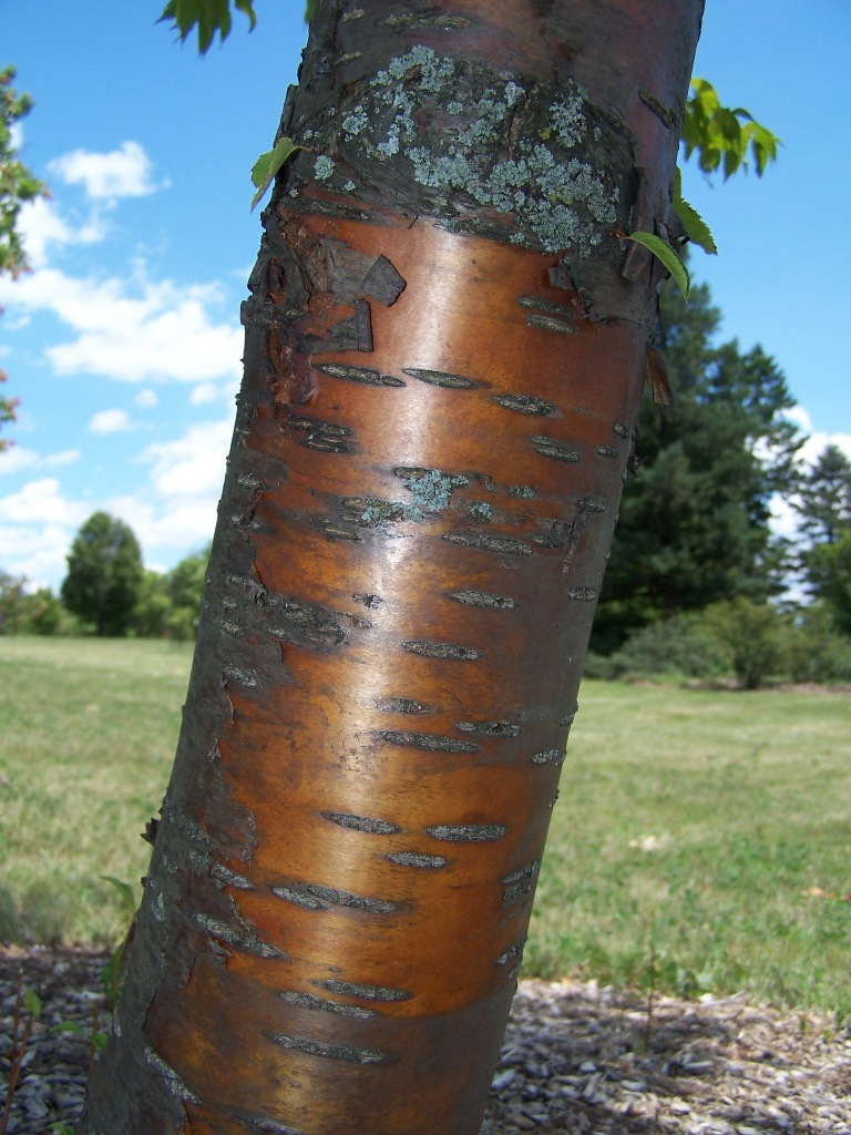 Prunus maackii Bark detail. Morton Arboretum acc. 240-93-2